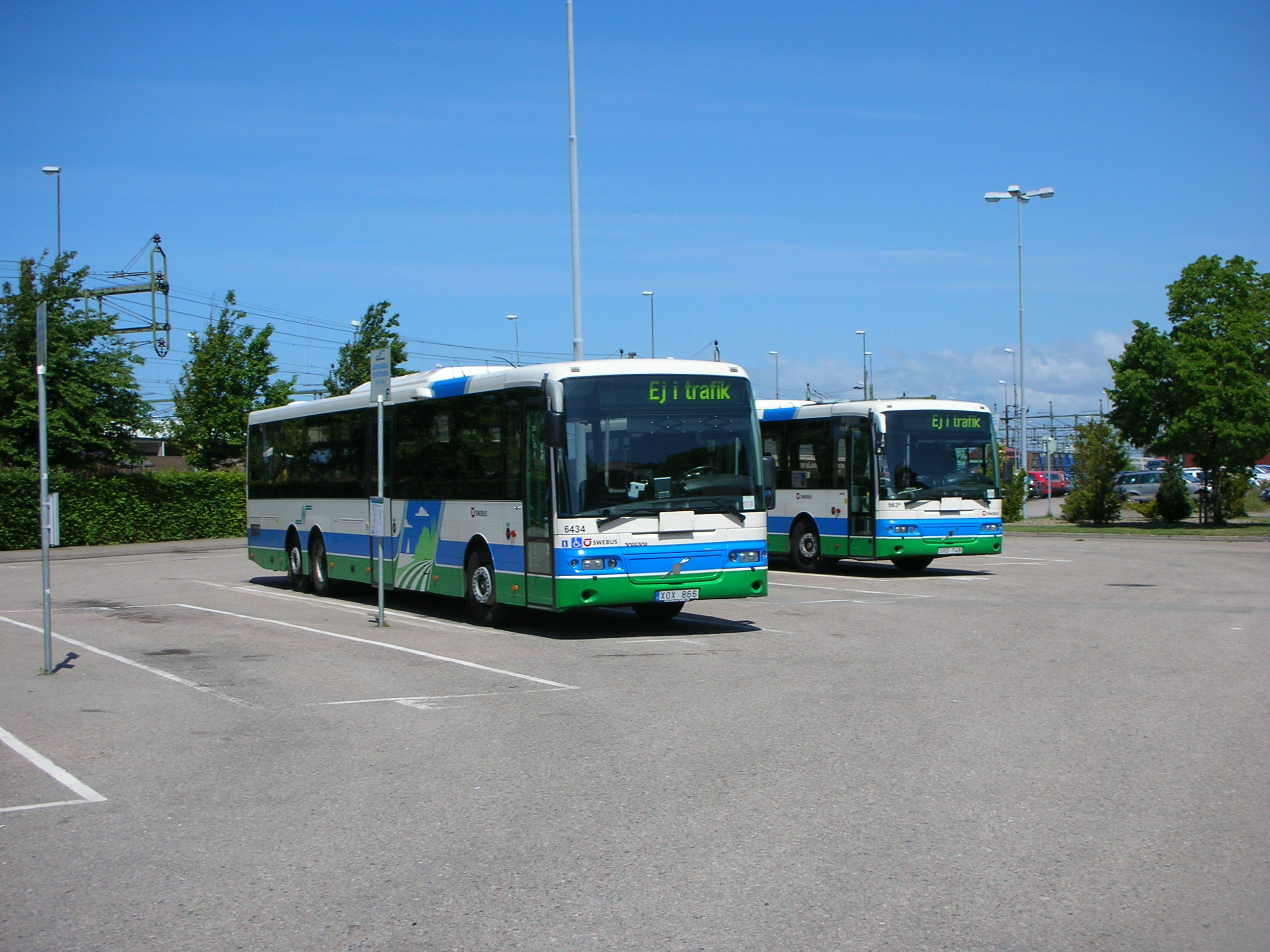 Två av Hallandstrafikens bussar i Varberg.